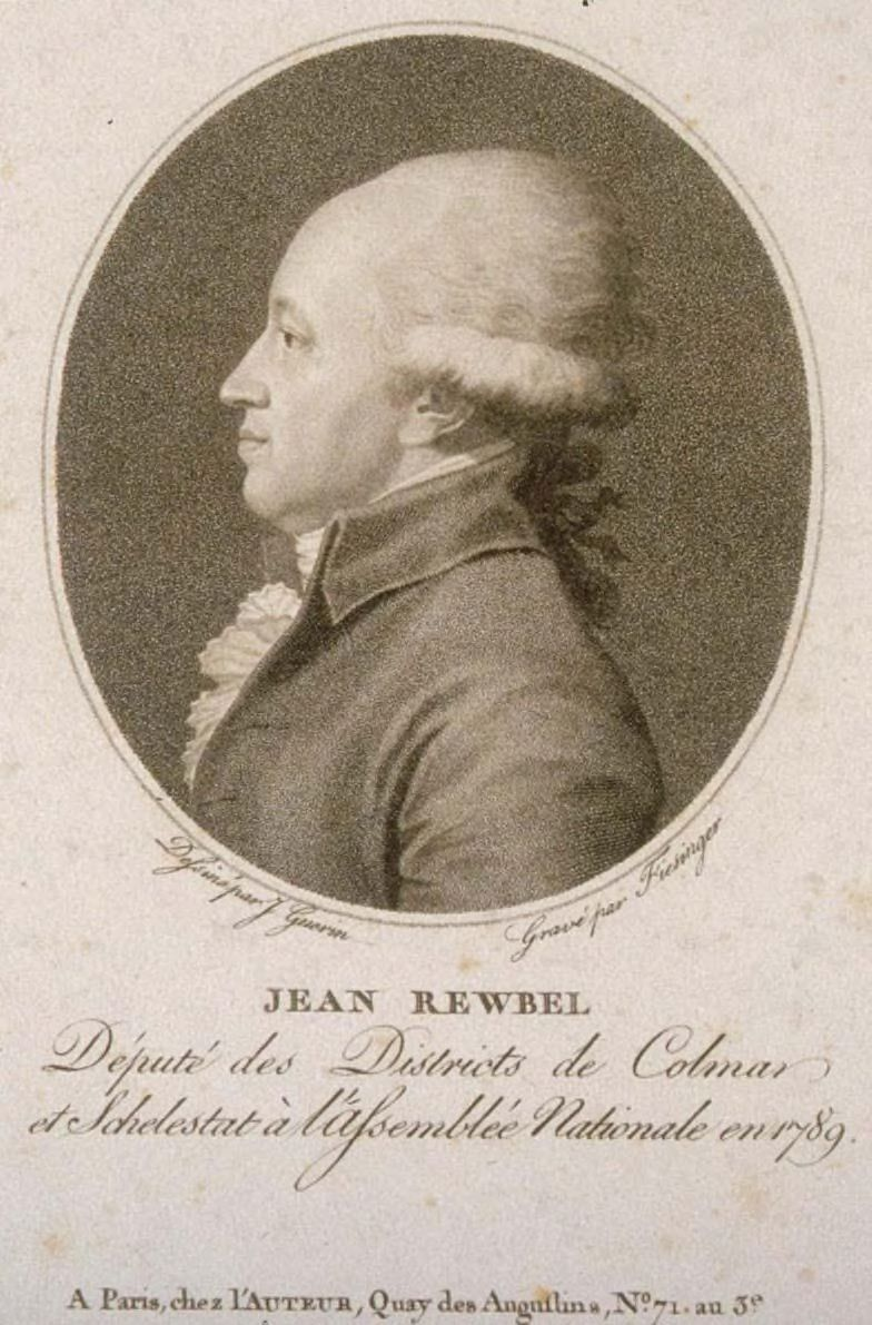 Jean-François Reubell, député des districts de Colmar et Schelestat à l'Assemblée nationale de 1789 (estampe).